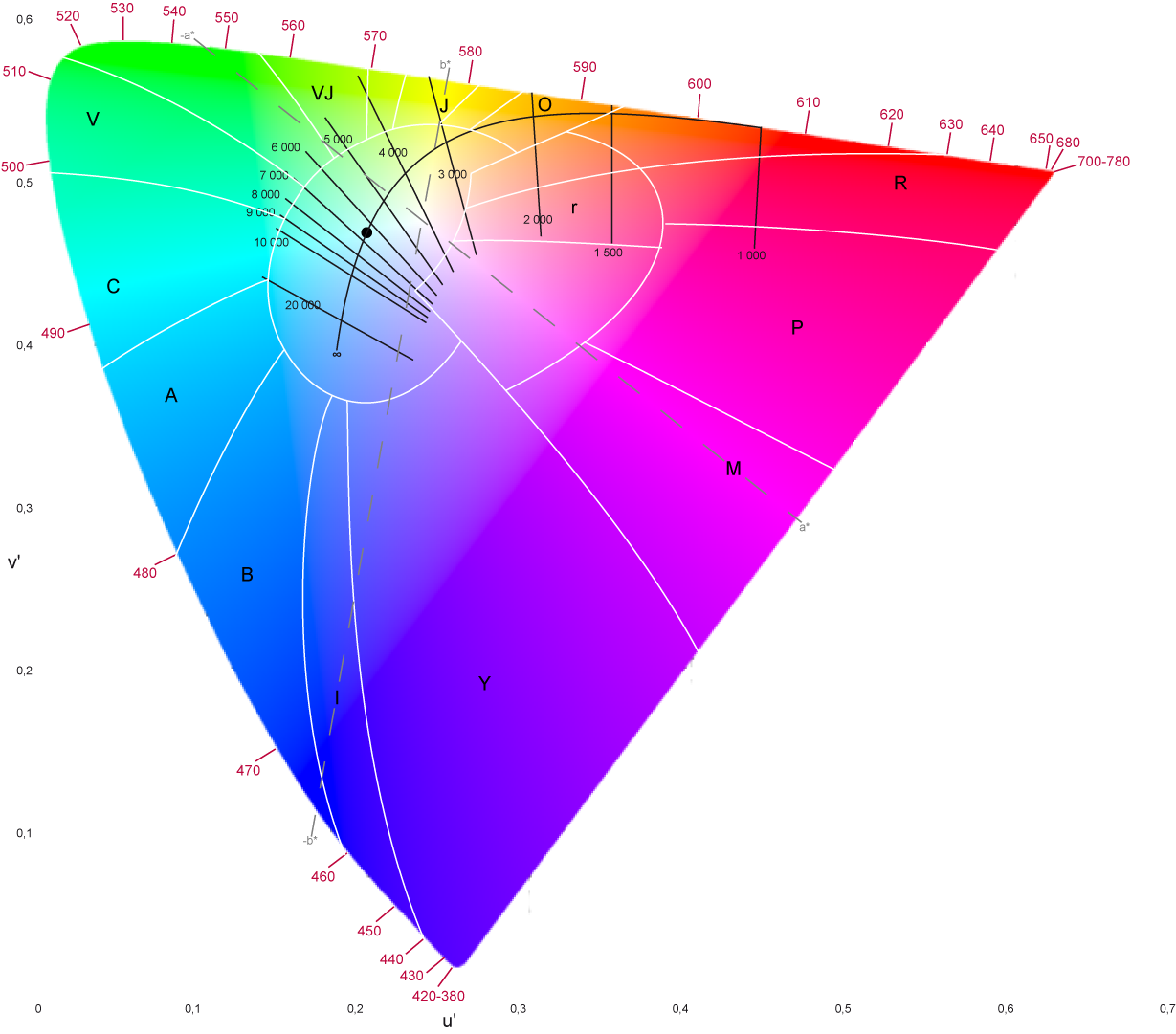 espace de couleur CIE LUV sur lequel est reporté les axes a* b* et les températures de couleurs